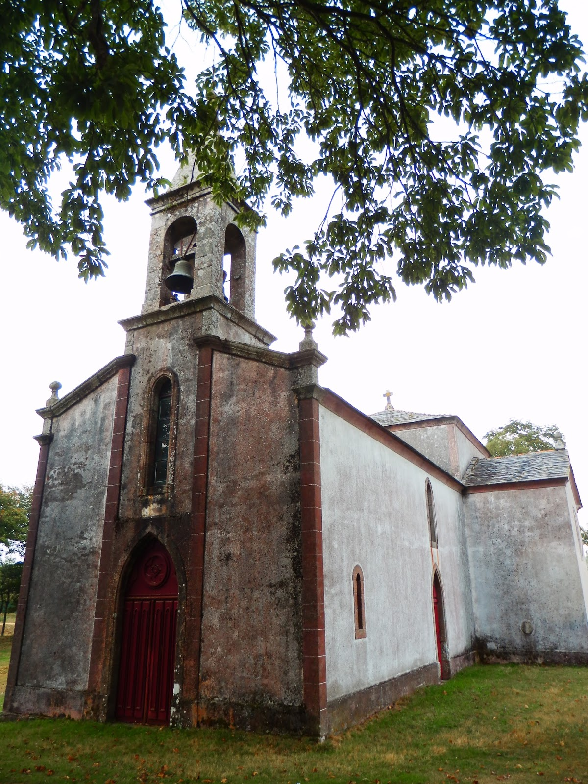 Igrexa de San Cosme da Montaña, Galgao, Abadín.